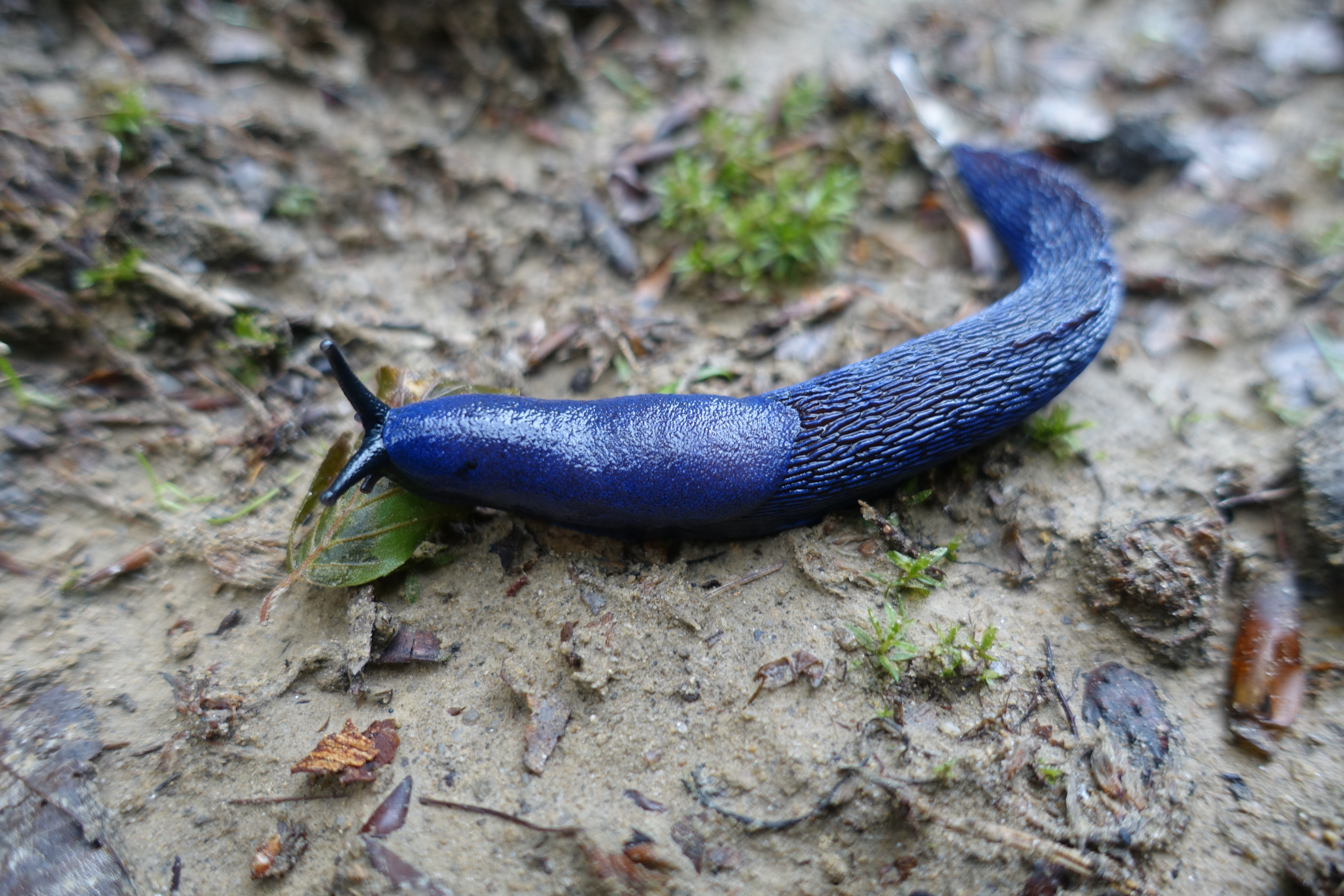 Modranka karpatská (Bielzia coerulans), CHKO Bílé Karpaty